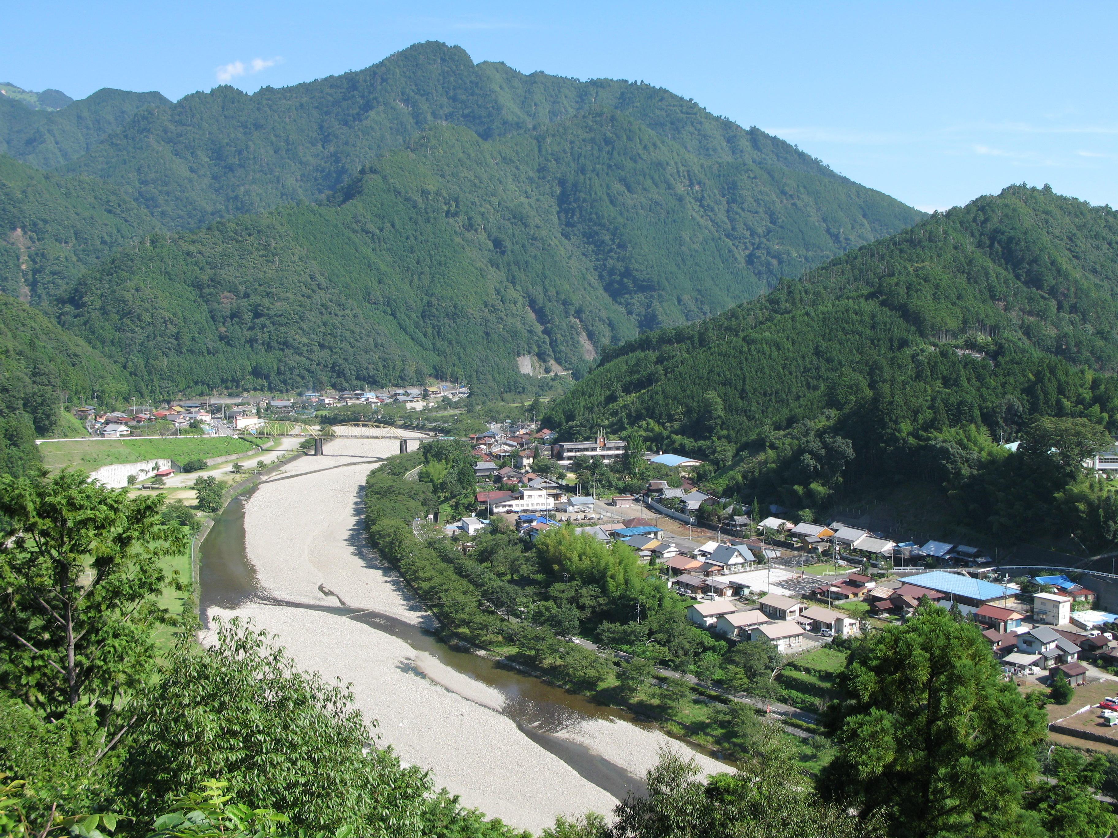 Ikehara, Shimokitayama, Nara, Japan